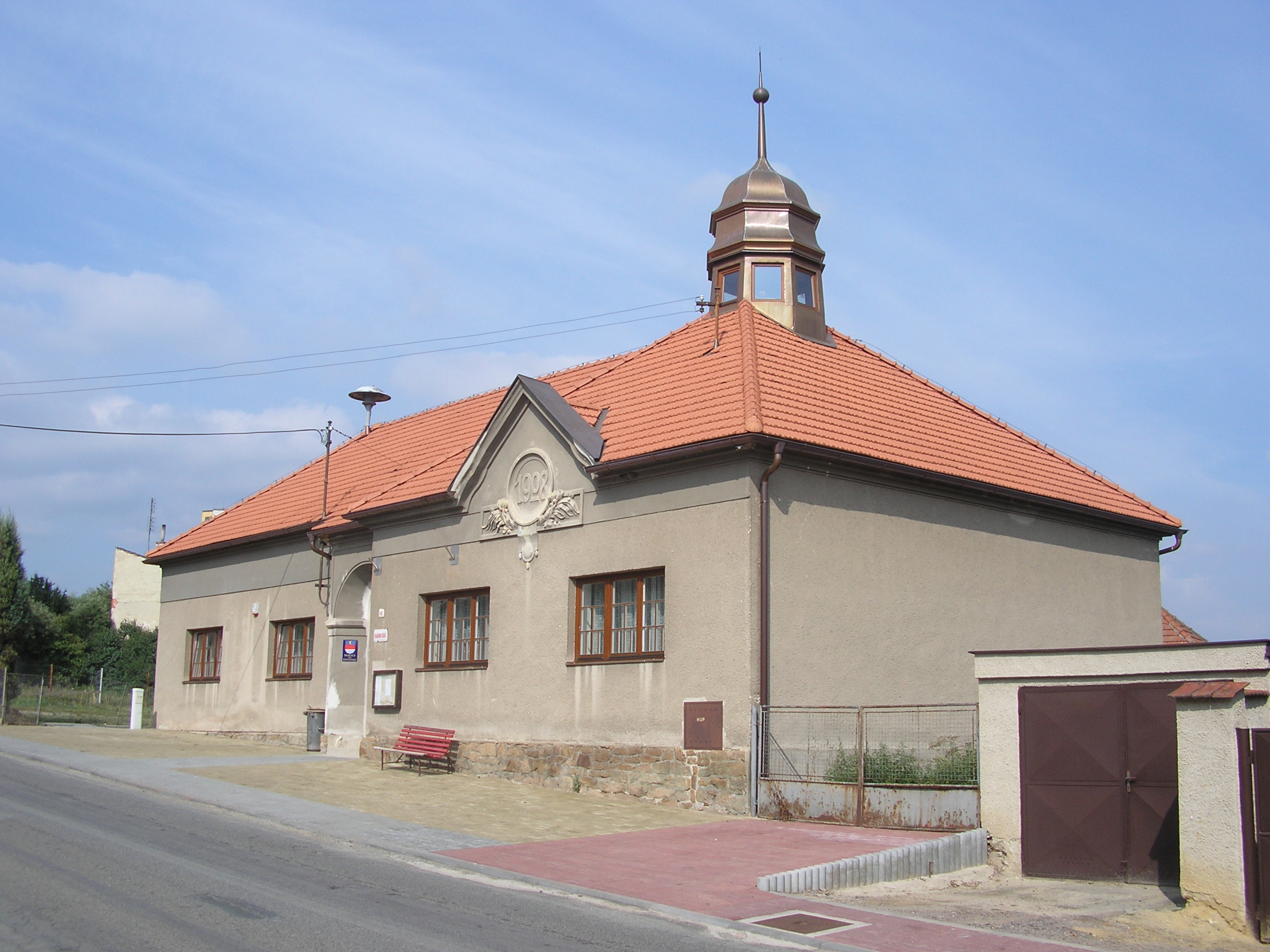 Obecní úřad ve Skalici nad Svitavou